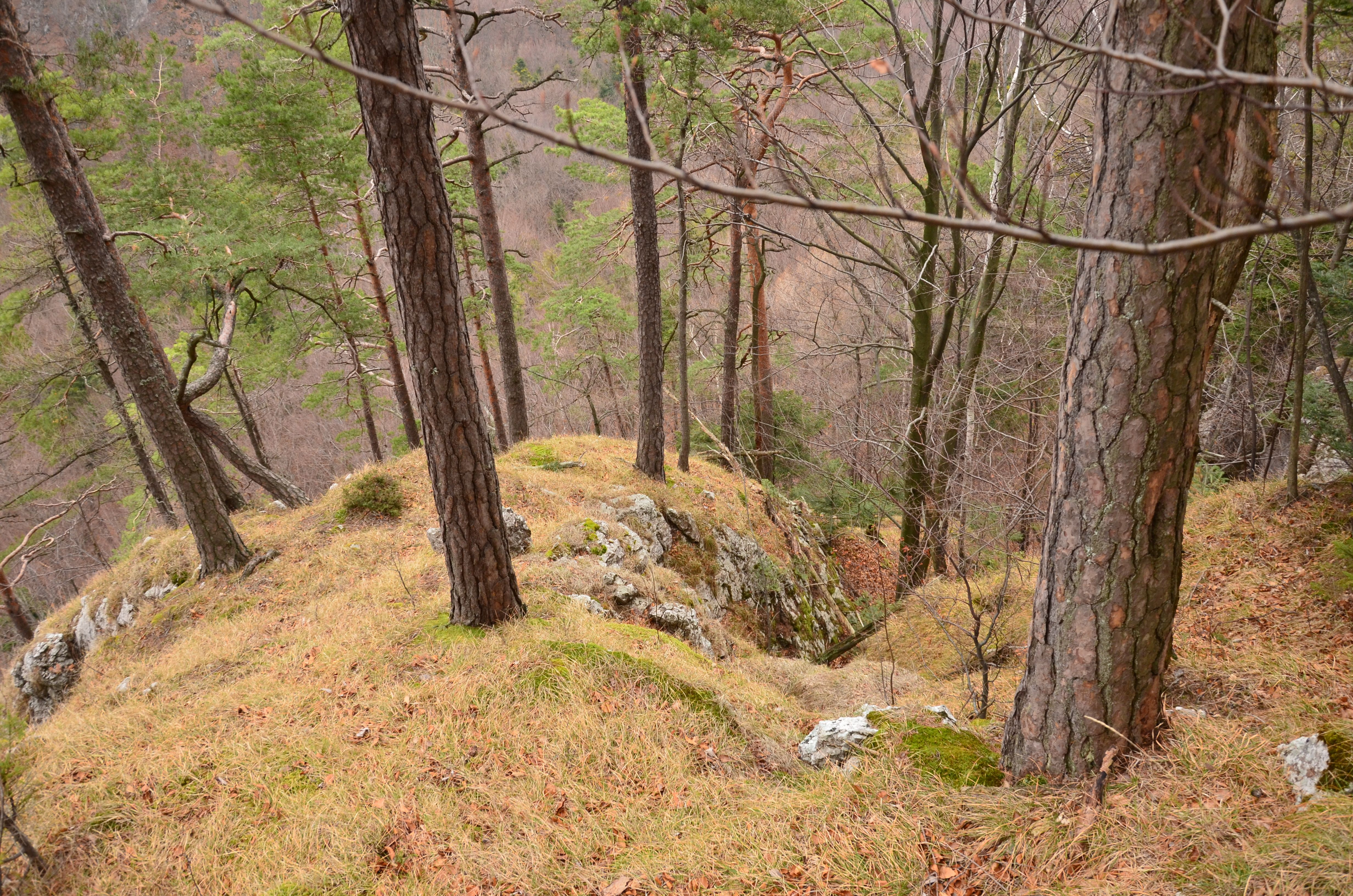 Reliktné lesné spoločenstvá, v ktorých dominuje borovica sosna, sa zachovali v severovýchodnej časti planiny nad Baksovou dolinou, kde panuje neschodný skalný reliéf.